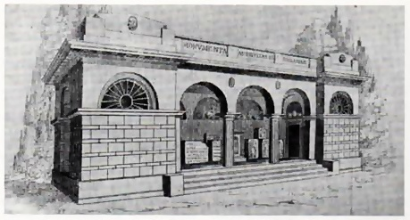 Antikenhalle Speyer, Zeichnung vom Erbauer Johann Philipp Mattlener (+ 1857)